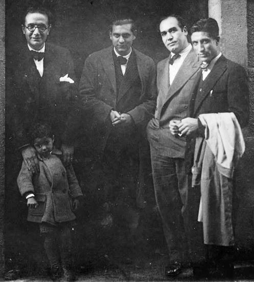 Alfonso Daniel Rodríguez Castelao, Luís Seoane, Xosé Eiroa e Arturo Cuadrado, diante do portal da consulta do Dr. José Barros Sanromán en Santiago de Compostela no ano 1932.